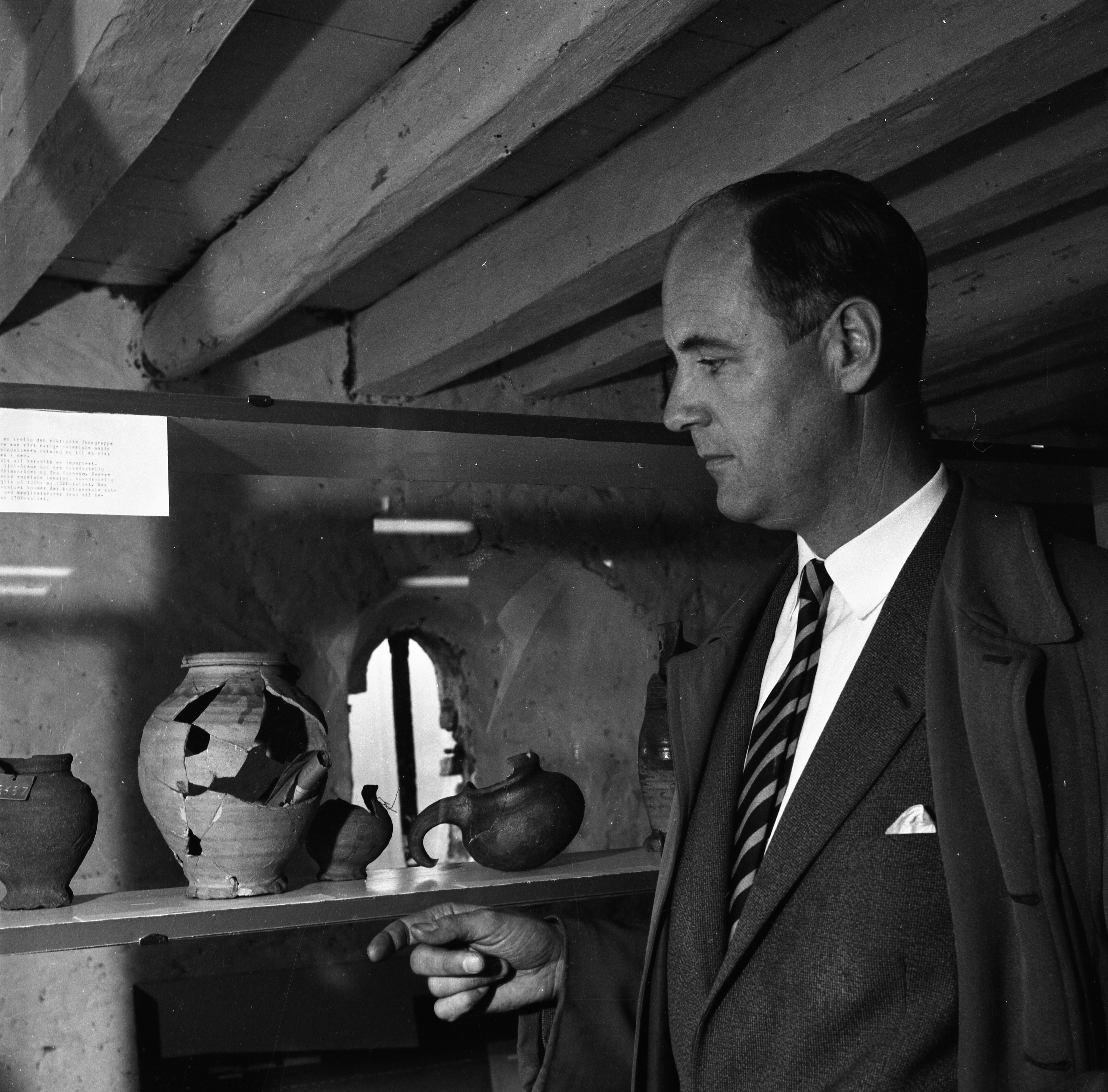 Format: Negativ 120 film Dato / Date: ca. 1968 Fotograf / Photographer: Eirik Sundvor (1902 - 1992) Sted / Place: Bergen Wikipedia: Asbjørn Herteig (1919 - 2006) Wikipedia: Historisk arkeologi Eier / Owner Institution: Trondheim byarkiv, The Municipal Archives of Trondheim Arkivreferanse / Archive reference: Tor.H43.Bxx.F16106 Merknad: Monterteksten lyder: Keramikken er trolig den viktigste funngruppe da den bedre enn vårt øvrige materiale angir handelsforbindelsenes retning og til en viss grad styrken i dem. Praktisk talt all keramikk er importert. I 1000- og 1100-årene kom den hovedsakelig fra Nedre Rhinområdet og fra Hannover. Senere blir det sterke engelske innslag, hovedsakelig fra Øst-Anglia på 1200- og 1300-tallet. Men rundt 1400-tallet kommer det kontinentale materiale inn med kvalitetsvarer fram til begynnelsen av 1700-tallet.